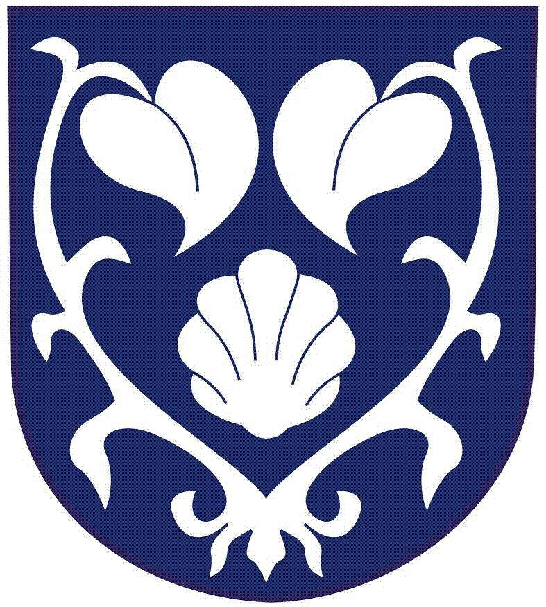 Znak obce Černčice (okres Náchod)